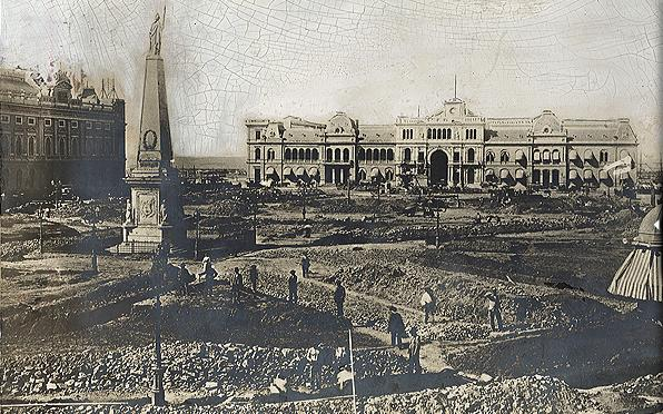 Vista de las obras en la Plaza de Mayo, para transformarla según el diseño del paisajista francés Carlos Thays. Al fondo, la Casa Rosada, sede del Poder Ejecutivo Nacional. Aún no esta terminada (se inauguró en 1898). Buenos Aires, Argentina.